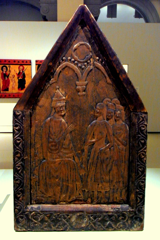 Autor.anónimo. Urna relicario de San Cándido procedene del monasterio de Sant Cugat del Valles (Barcelona) Datada 1292 Se conserva en el Museo Nacional de Arte de Cataluña